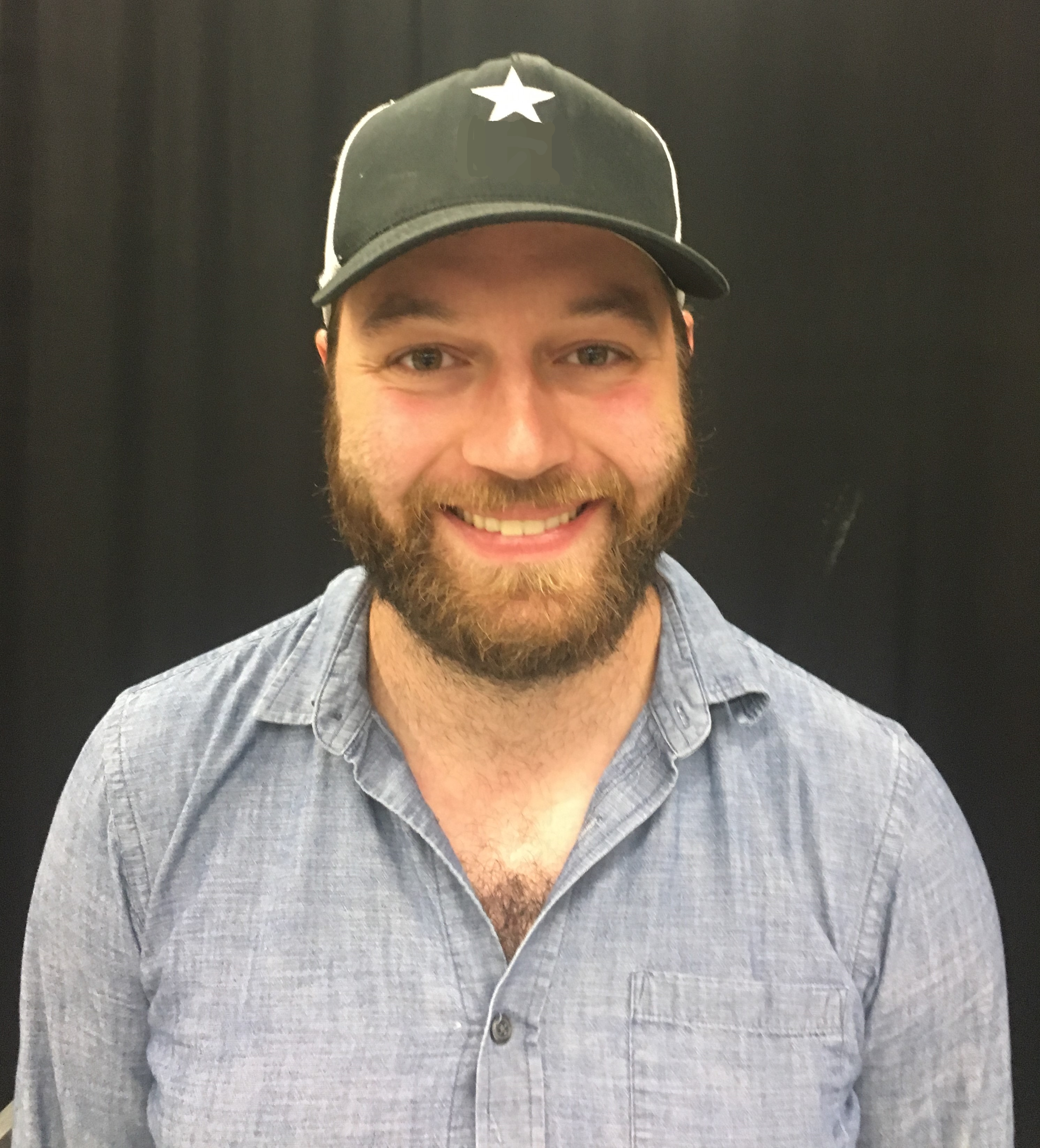 Gabriel Robichaud